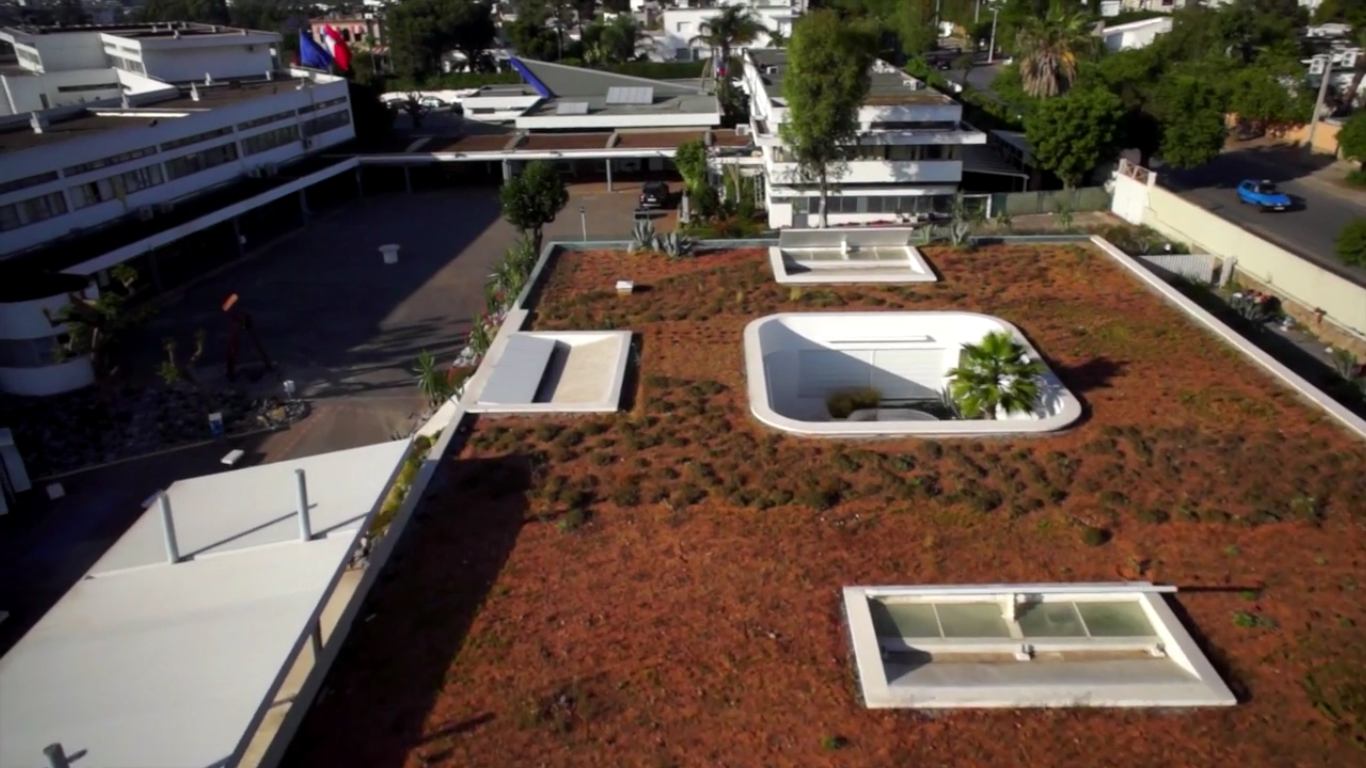 Le CDI vu de haut